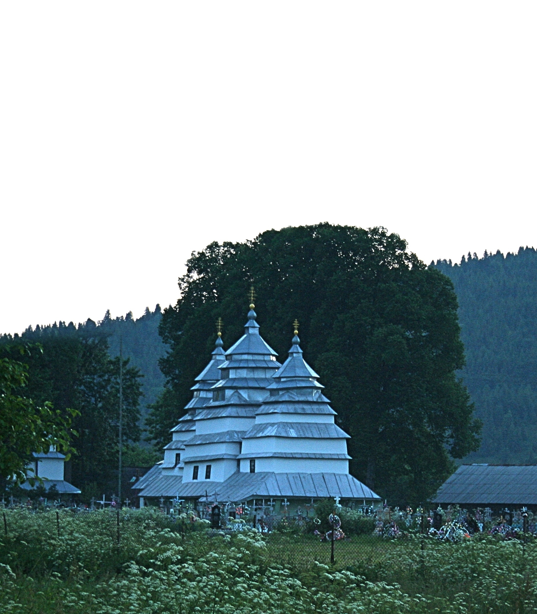 с.Нижнє Висоцьке